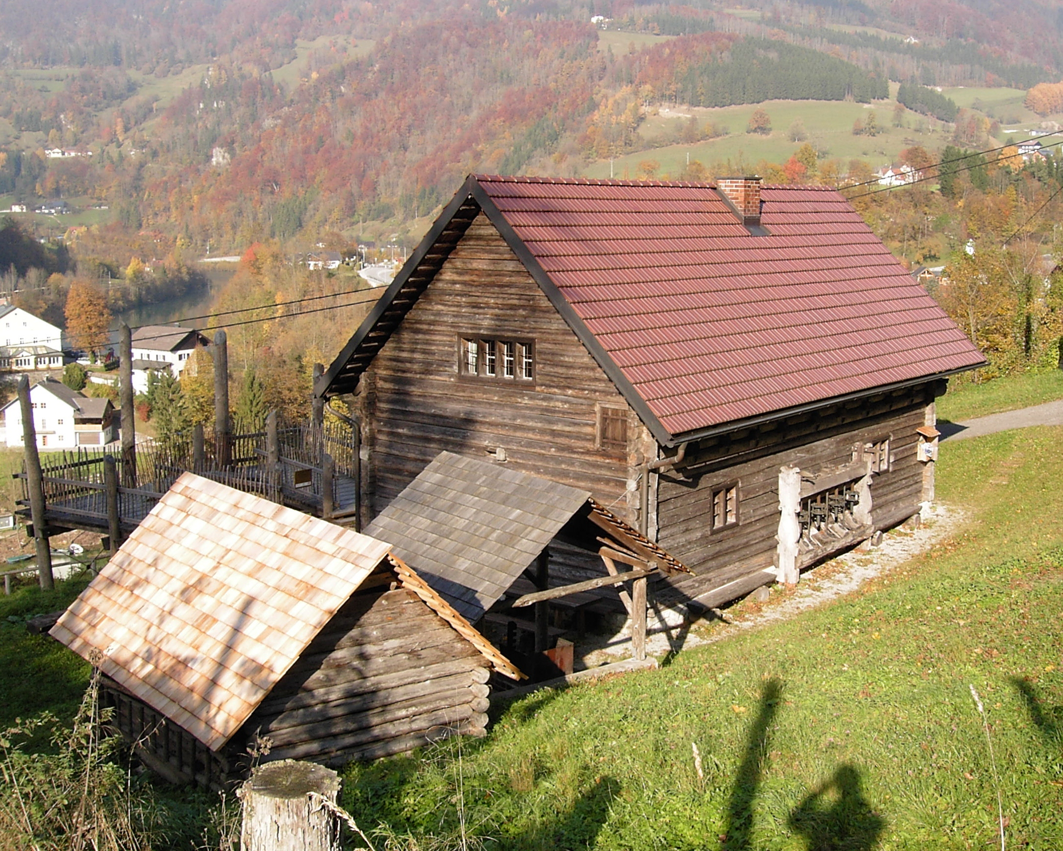 Reichraming Forstmuseum Museumsweg 9